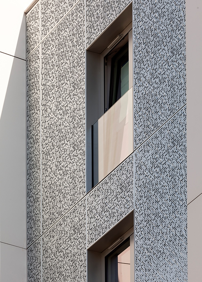 detal